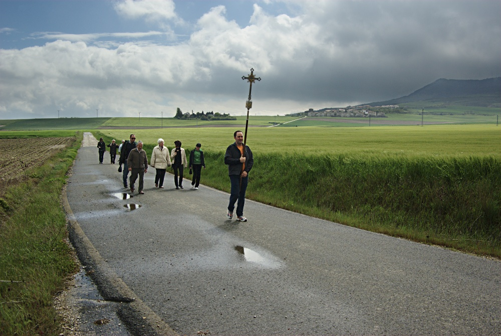 Un poco tarde, pero ahora que llega el invierno os muestro esta mini-romería de mi pueblo. Tradicionalmente la romería tenía la finalidad de pedir buen tiempo para obtener buenas cosechas. En esta ocasión, va a ser para que tengamos buen tiempo para "afotar". Saludos.